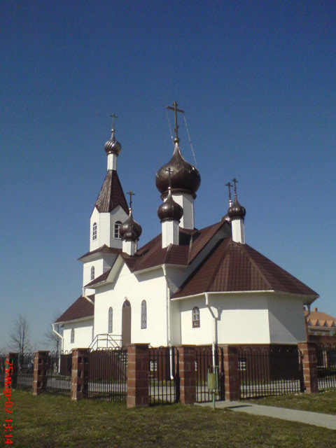 Царква. Бялынічы